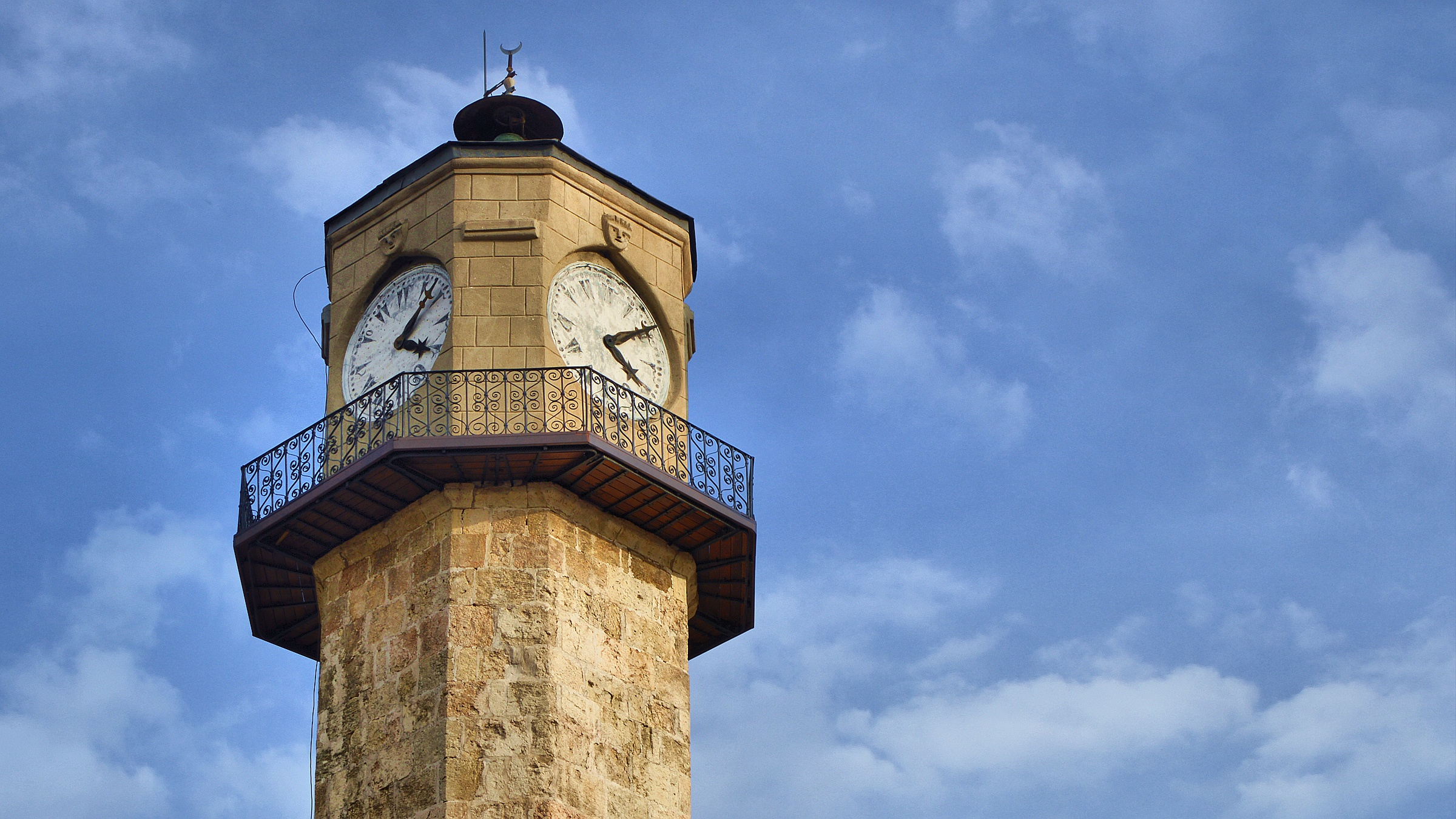 Tarsus, Mersin, Saat Kulesi, Clock Tower, Turkey